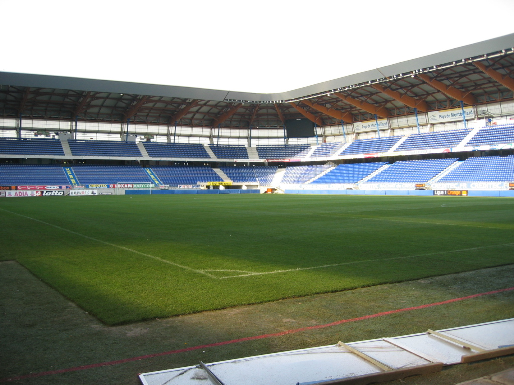 Stade Auguste-Bonal Sochaux